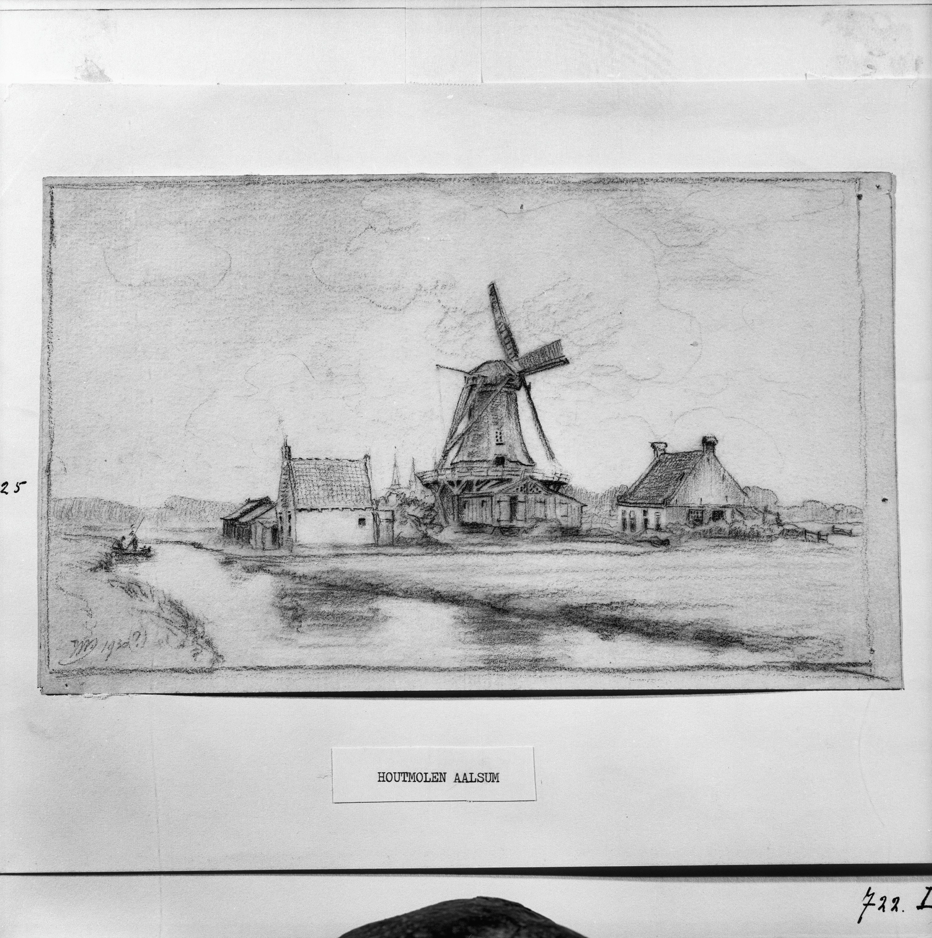 Houtzaagmolen: Tekening van houtmolen Aalsum (opmerking: Reproductie van tekening uit: Collectie Dokkum's Museum)